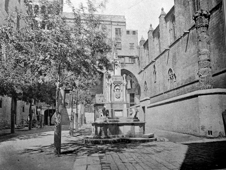 Fuente de la Plaza del Rey, Barcelona. Obra de Francesc Daniel Molina (1853), desaparecida antes de 1934.